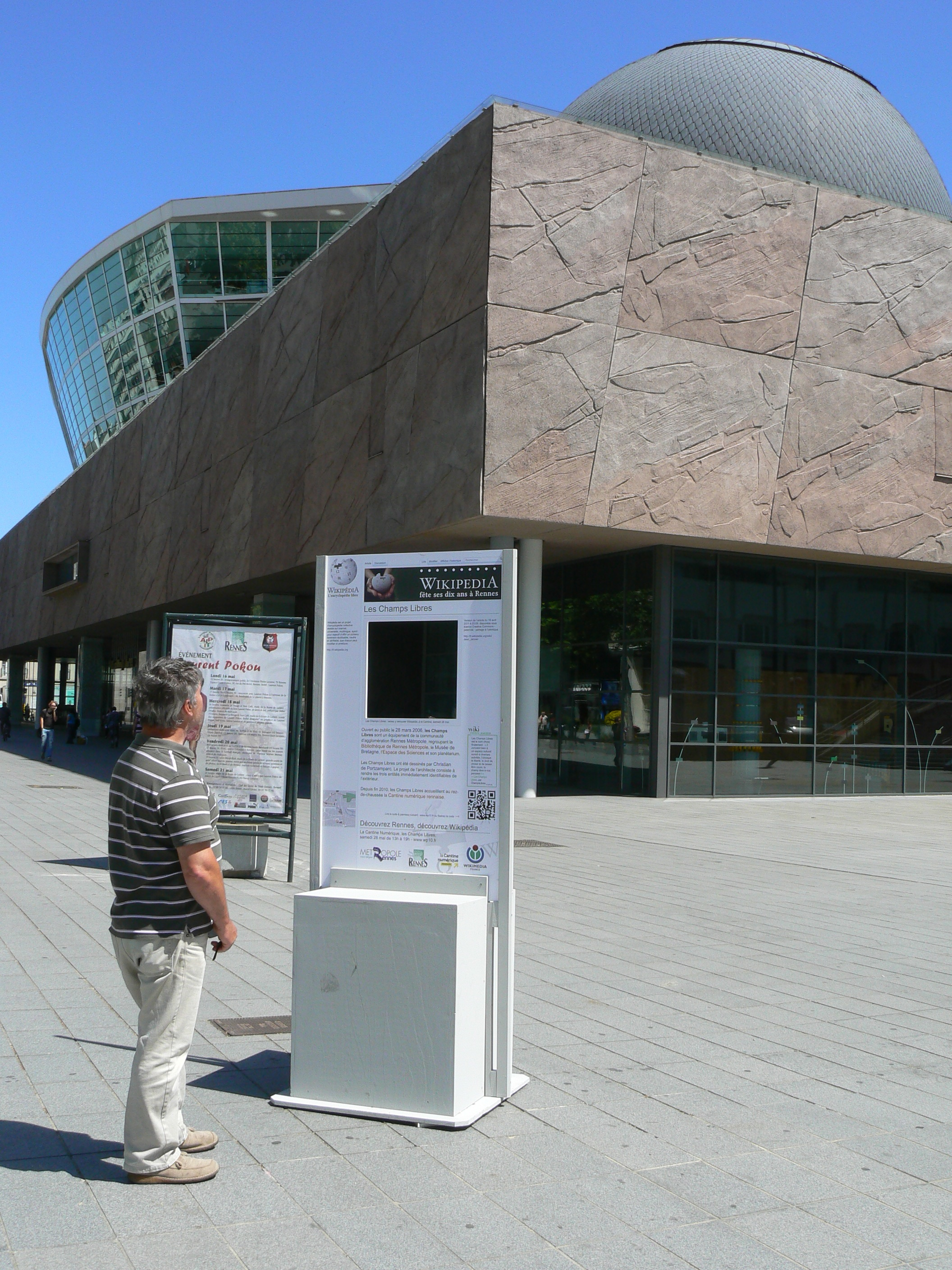 Wikipédia dans Rennes, panneau Les Champs Libres